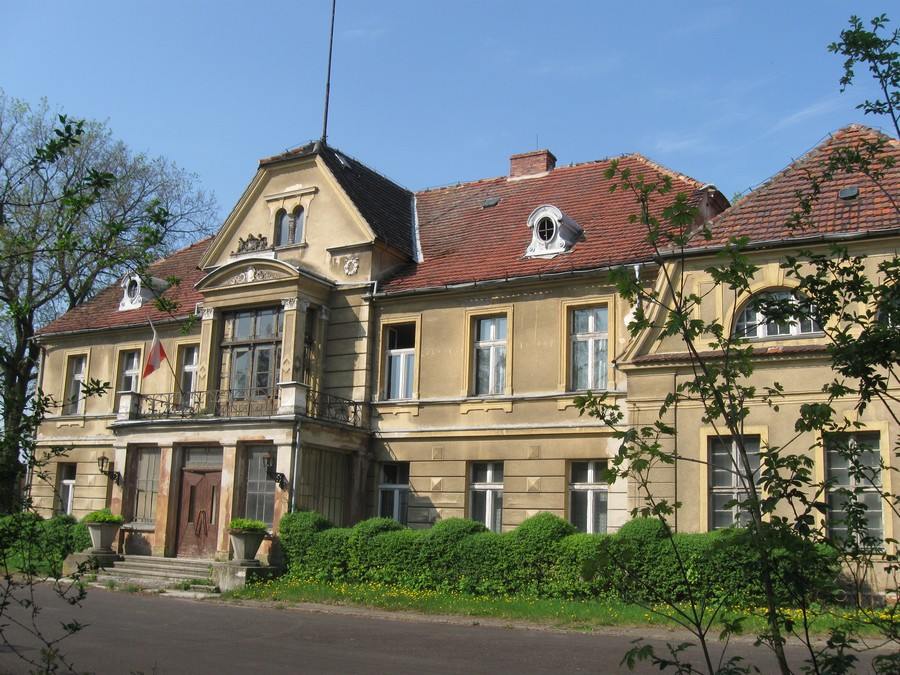 Stare Strącze - dwór